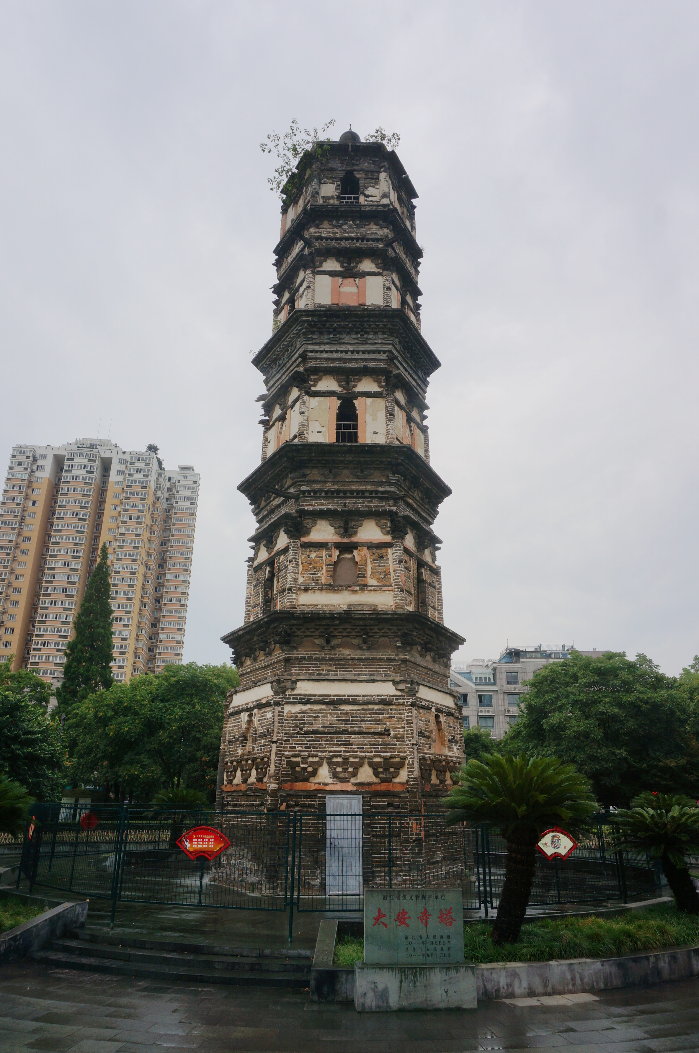 义乌大安寺塔，南面。